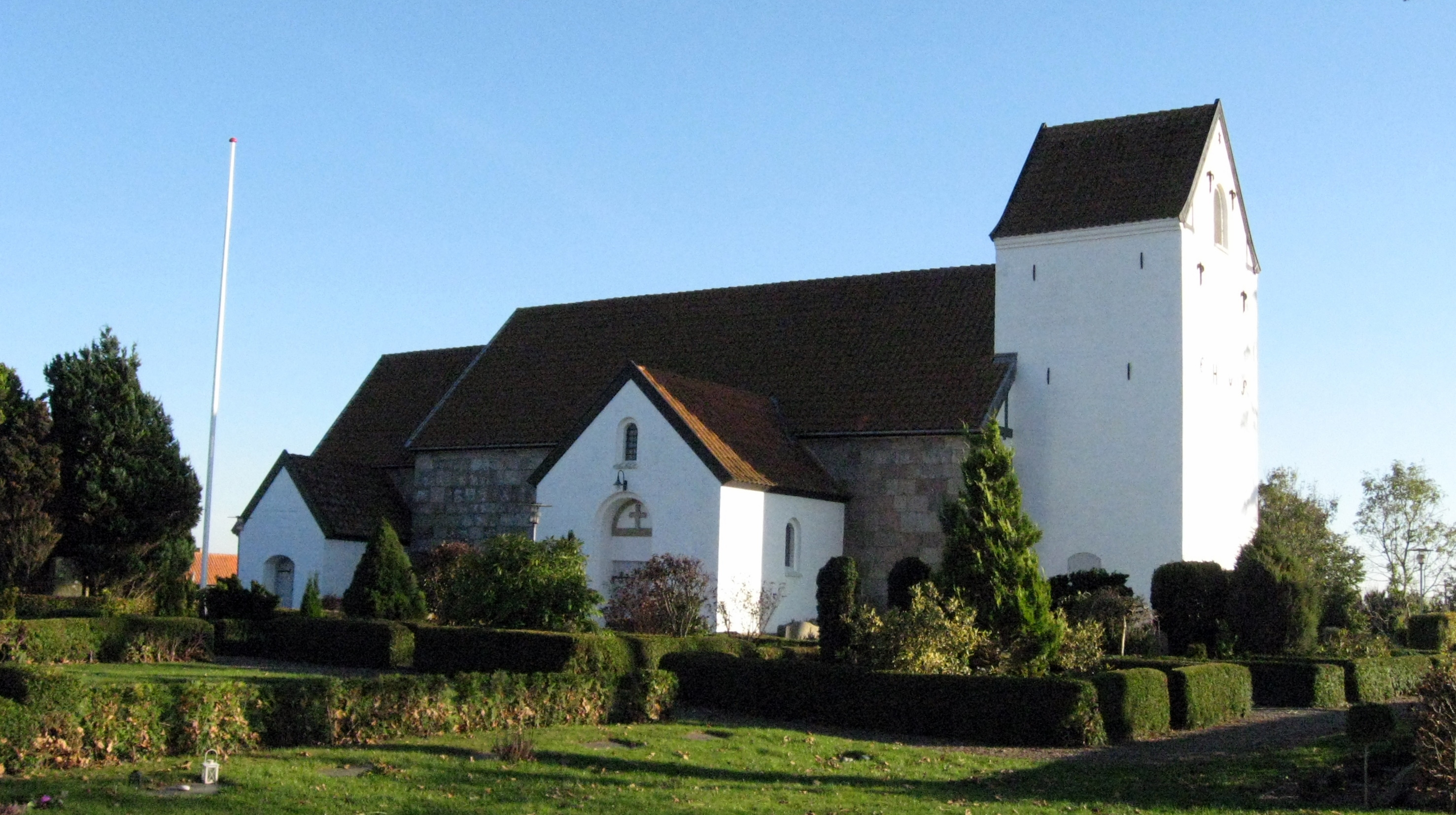 Nøvling Kirke, Aalborg Kommune